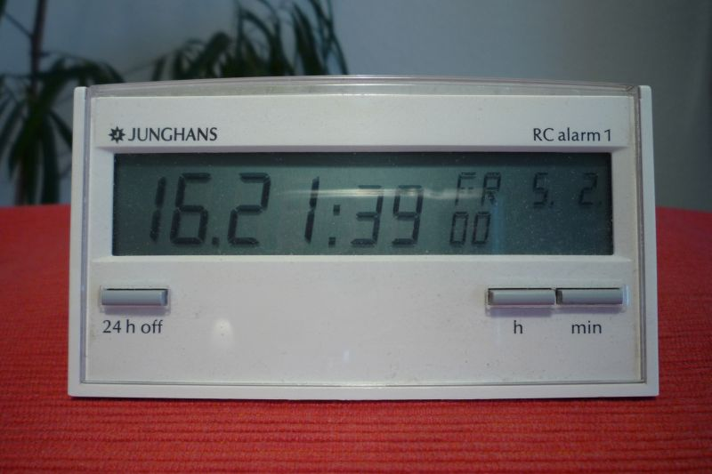 Junghans RC alarm 1, eine der ersten Funkuhren für den Konsumentenmarkt, 1988 (Preis damals 149,- DM)